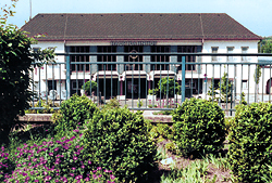 Bahnhof in Neunkirchen